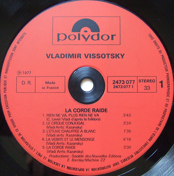 Vladimir Vissotsky – La Corde Raide - Polydor – 2473 077